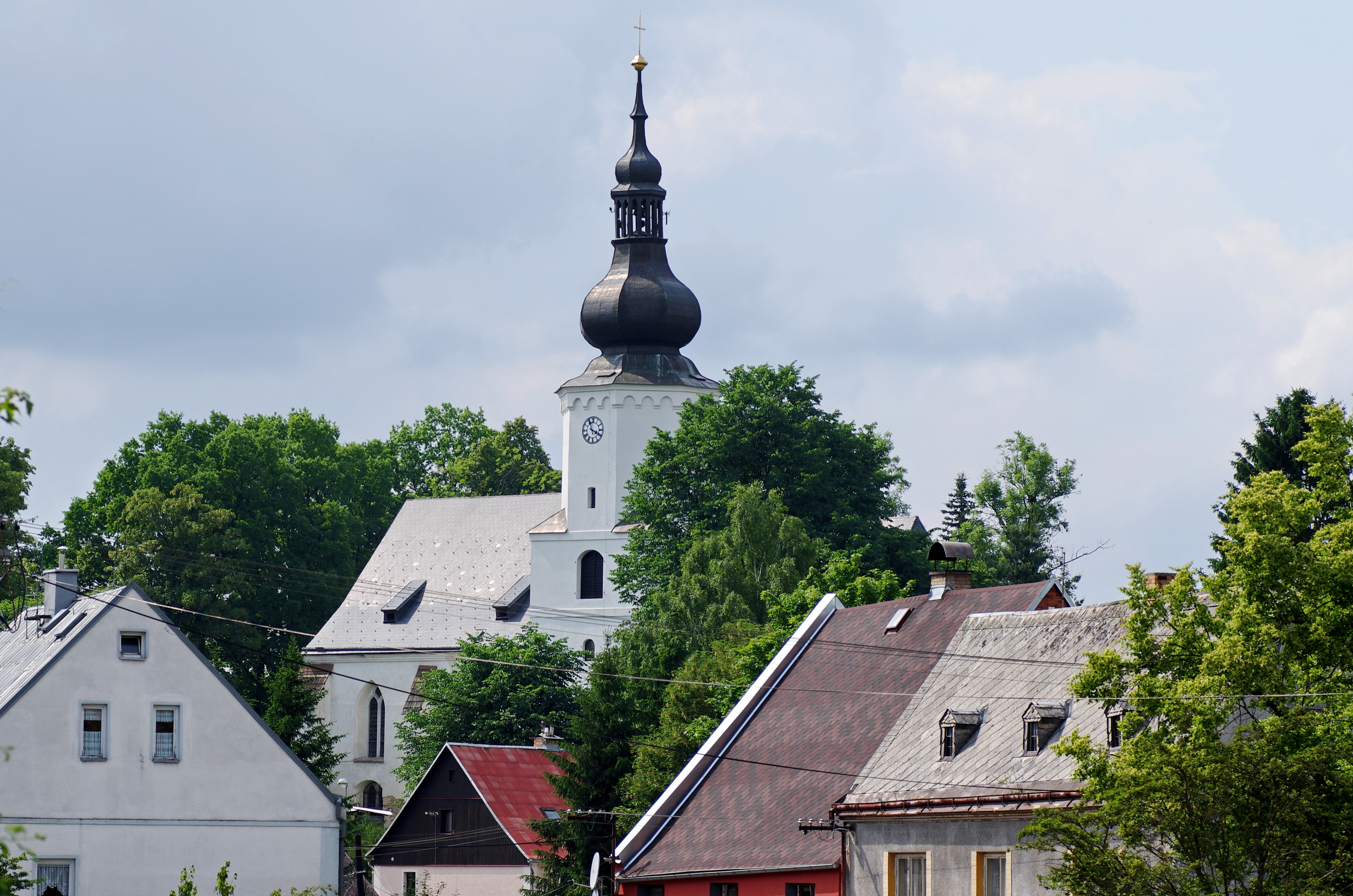 Kostel svatého Martina, Jindřichovice (okres Sokolov).